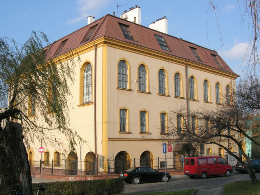 Jarosław (Poland), Big Synagogue